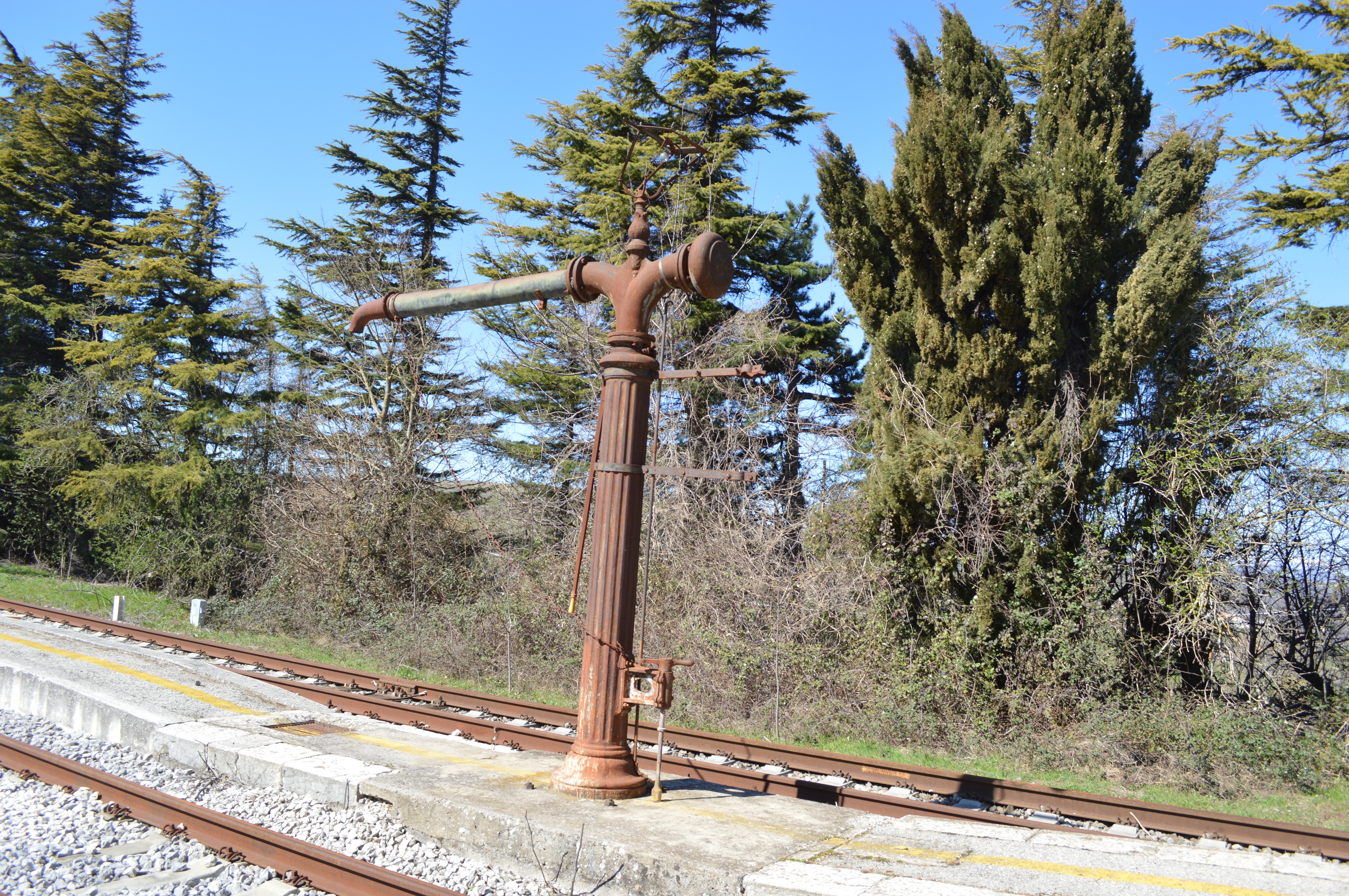 colonna idraulica per locomotive vapore (dismessa) Stazione di Campolieto- Monacilioni